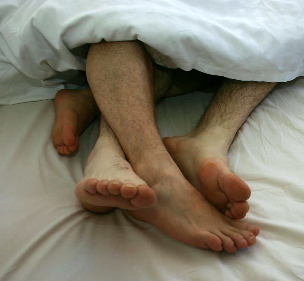 Schwules Zweisamkeit im Bett